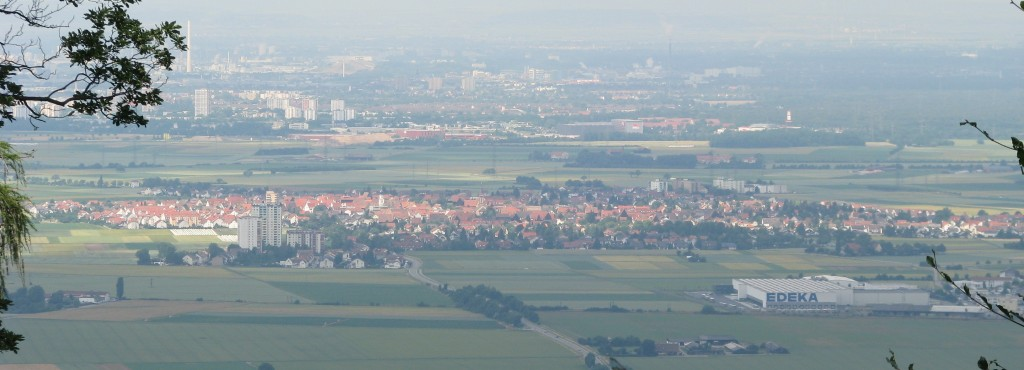 Heddesheim